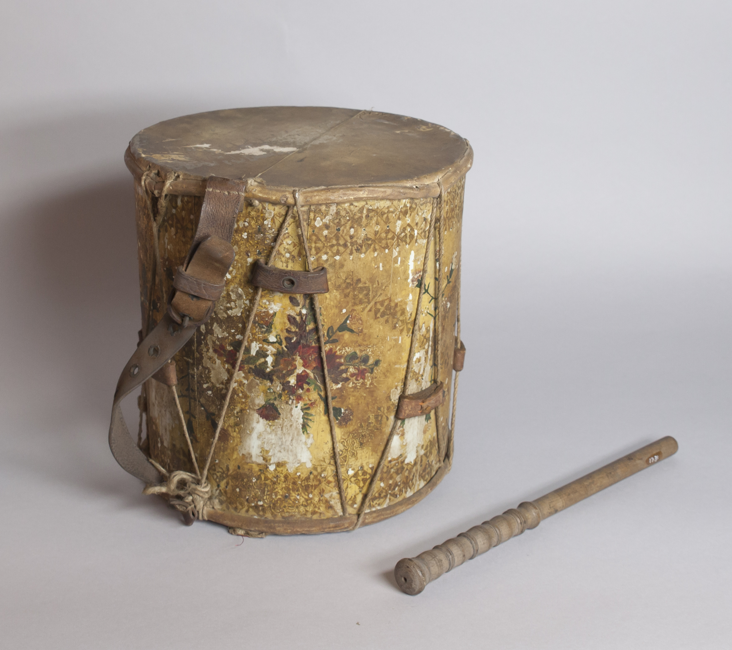 Tamborí, segle XIX, MDMB 1731